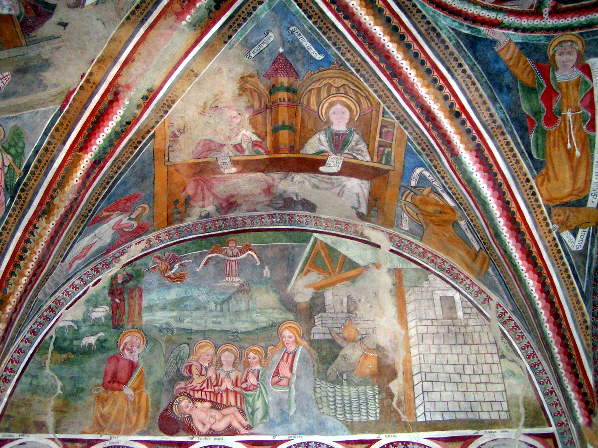 Chiesa di Santo Stefano al Colle